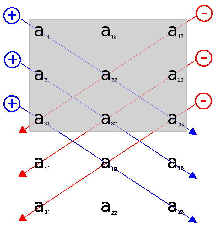 Schématické znázornění Sarrusova pravidla pro výpočet determinantu 3.řádu.